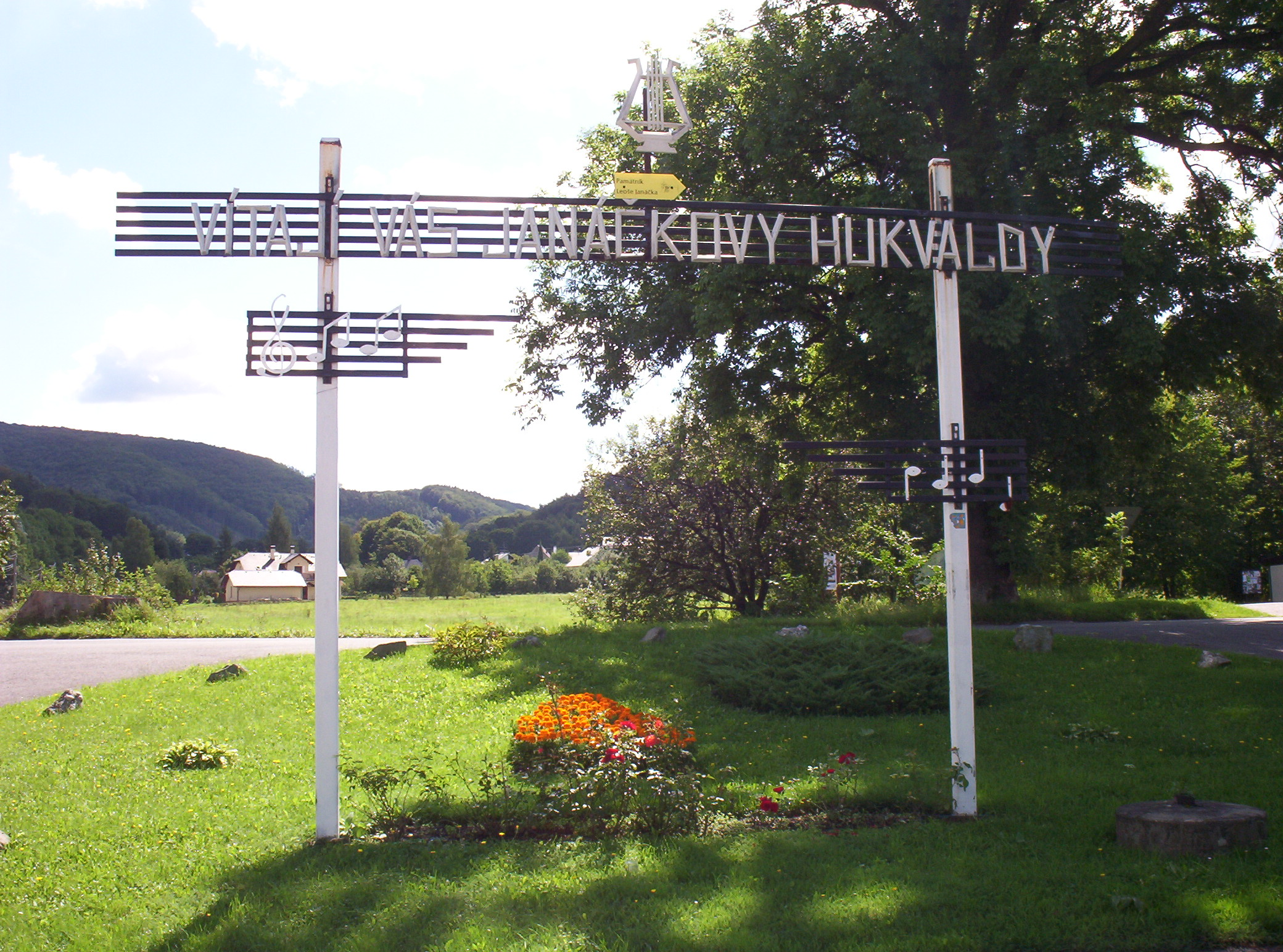 Uvítání při vjezdu do Hukvald